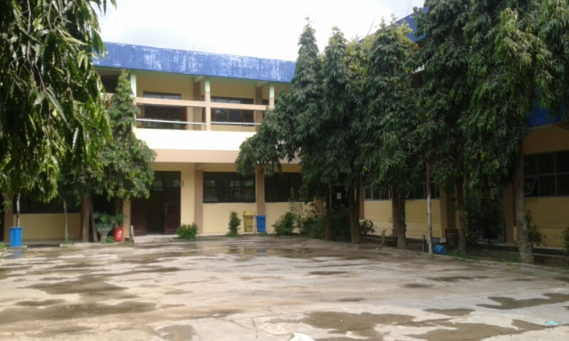 Halaman Belakang Sekolah SMPN 1 Depok